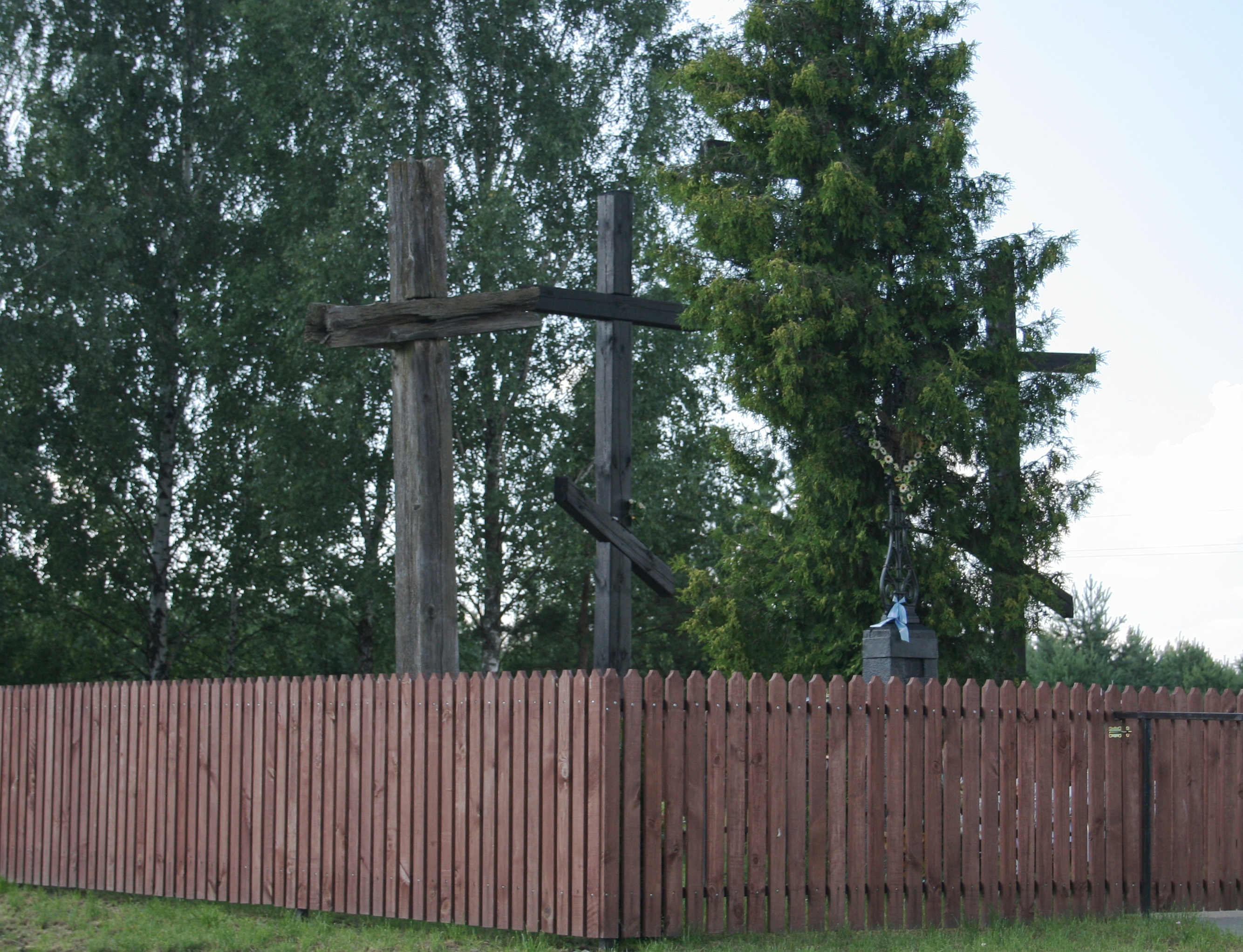 Krzyże przydrożne we wsi Suszcza, gmina Michałowo, woj. podlaskie